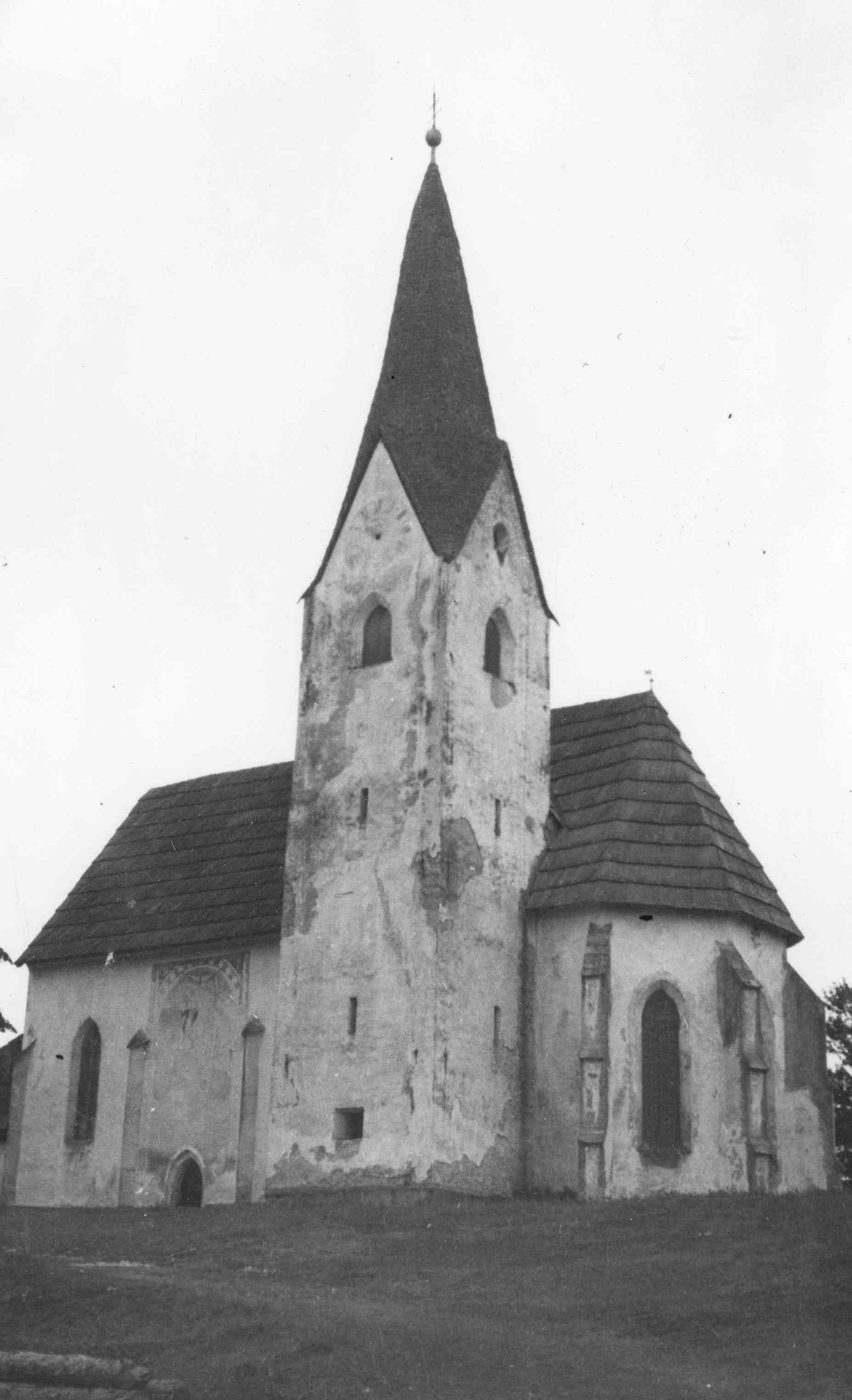 Cerkev v Bačah s Sv. Krištofom in trikotnimi podporniki na ladji ter baročno lopo pred cerkvijo.